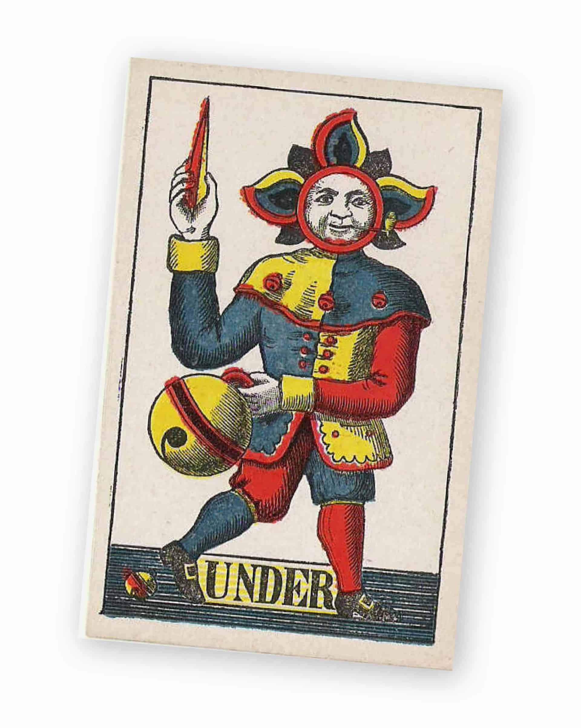 Einköpfiges Kartenbild von Jakob Peyer. Mit Grosser Wahrscheinlichkeit Schöpfer des heutigen Kartenbildes. über 100 Jahre später ist das heutige Kartenbild noch gut erkennbar.